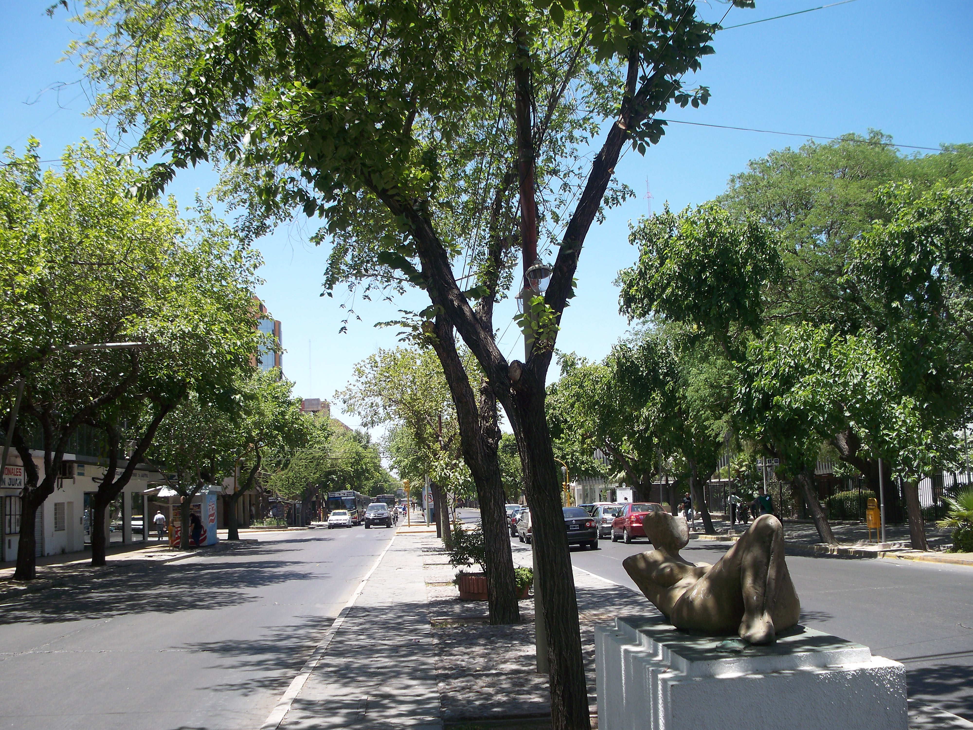 Boulevard de la Avenida Libertador General San Martín, en la Ciudad de San Juan, provincia del mismo nombre, Argentina.